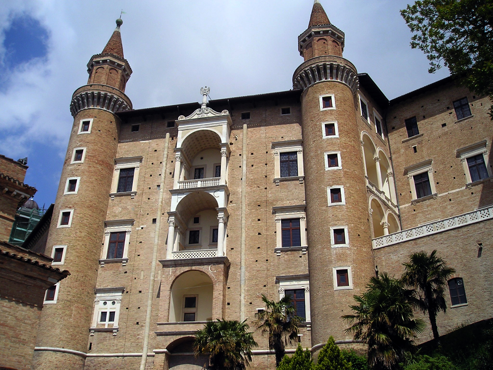 Il palazzo ducale di Urbino, autore Massimo Macconi